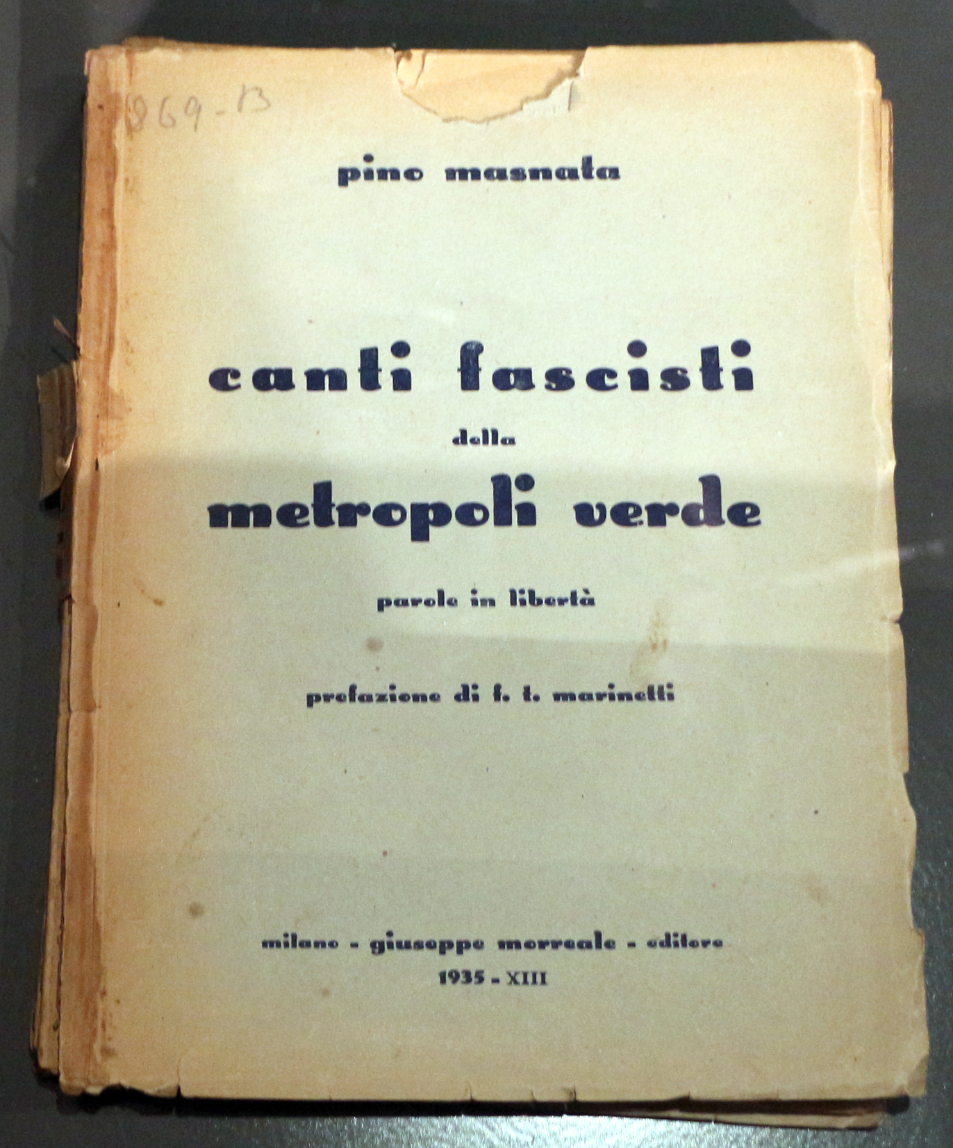 Il parco e i musei di Nervi This is a photo of a monument which is part of cultural heritage of Italy.